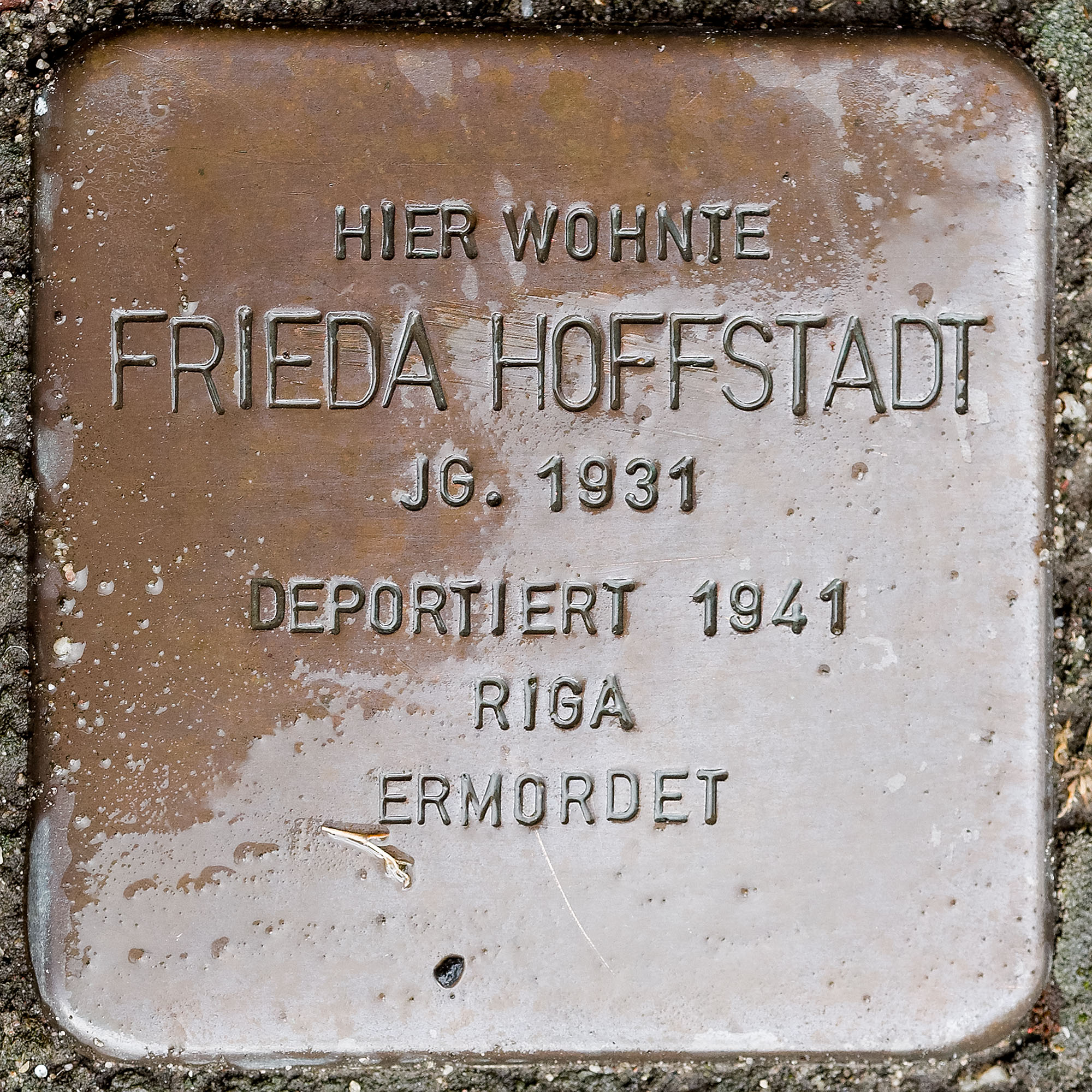 Stolpersteine Straelen: Hoffstadt, Frieda